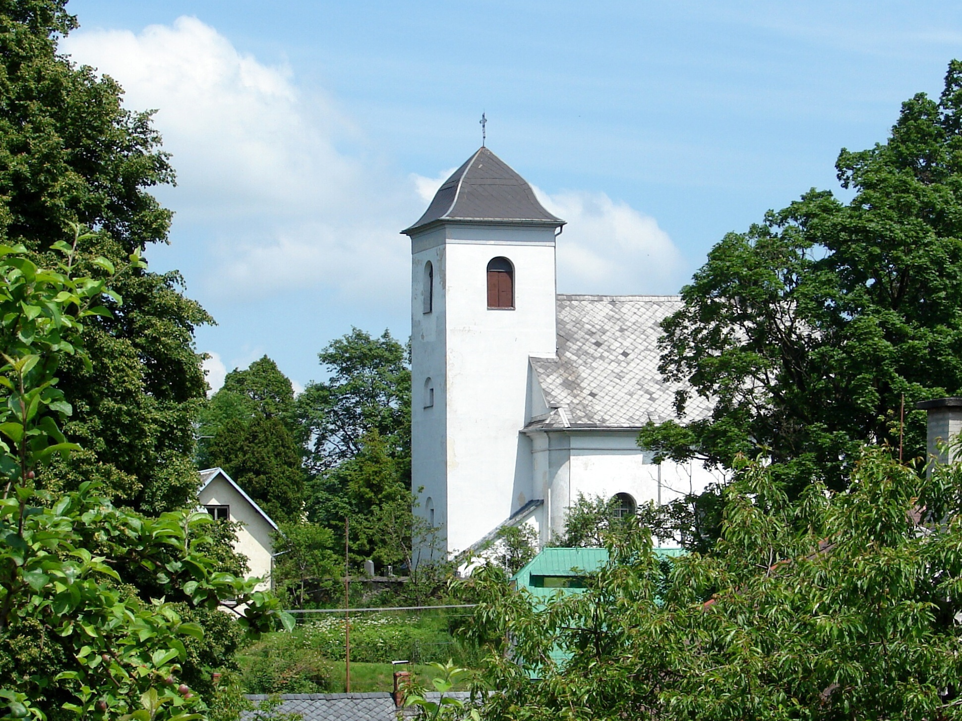 Kostel sv. Jakuba Většího (Dolní Guntramovice), ves, Dolní Guntramovice